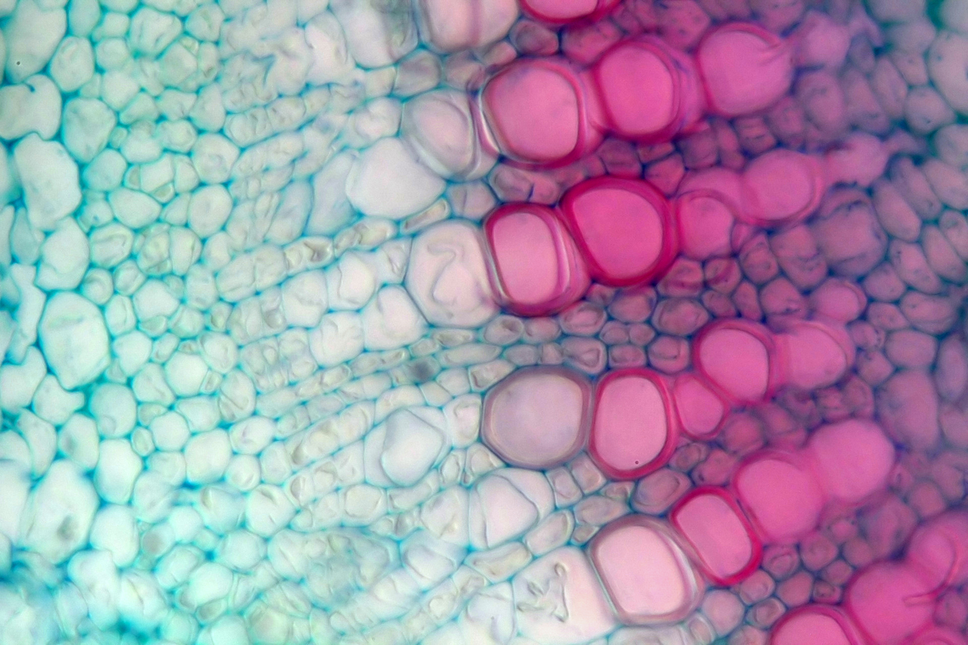 Lamium sp. (deadnettle), leaf, Etzold green.